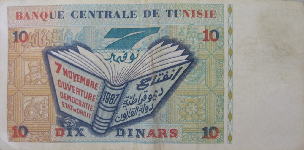 10 dinarów tunezyjskich - rewers